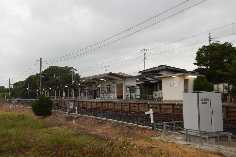 JR草江駅ホーム全景（2019年6月）